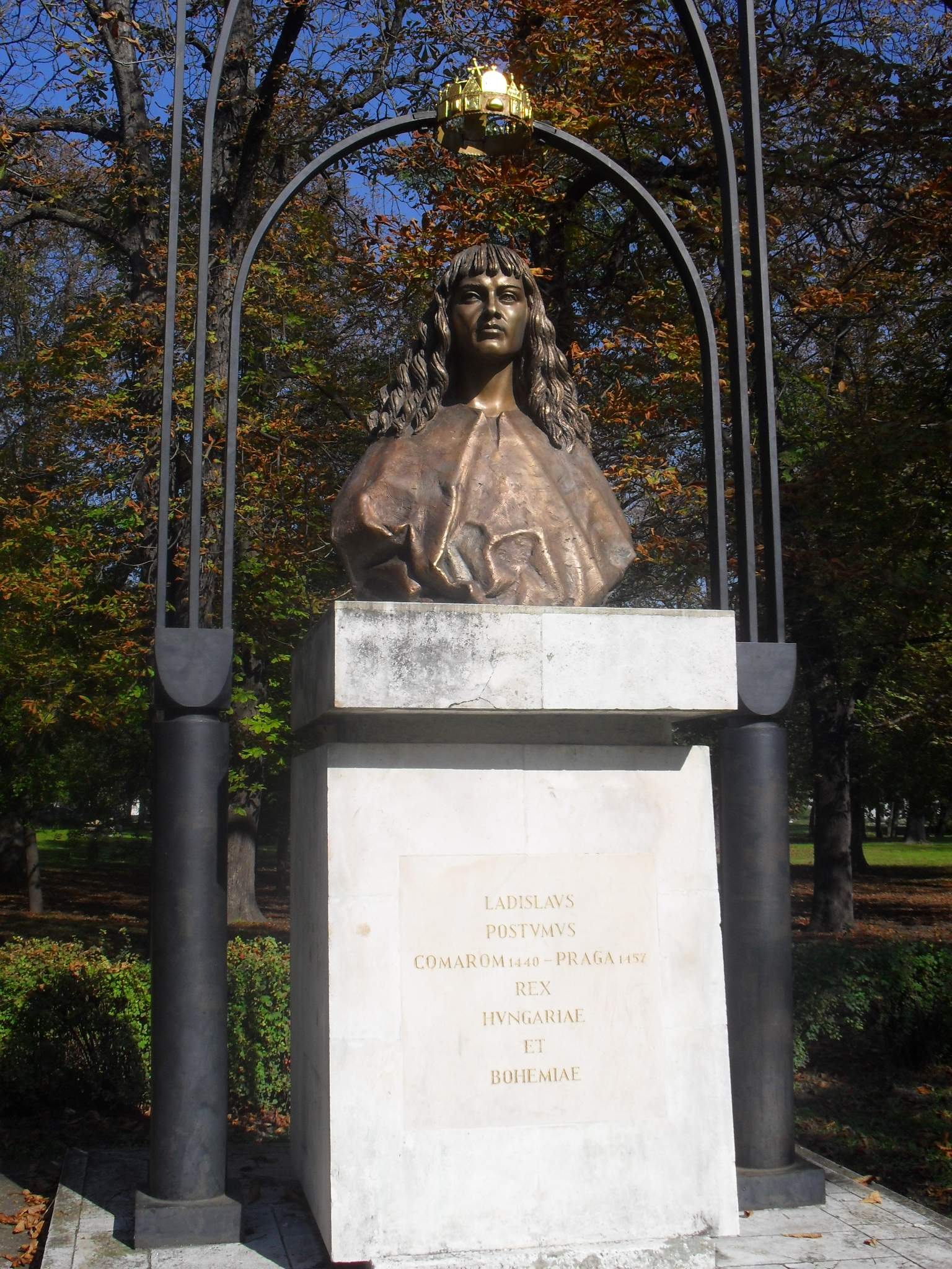 Komárom (SK) - V. László mellszobra